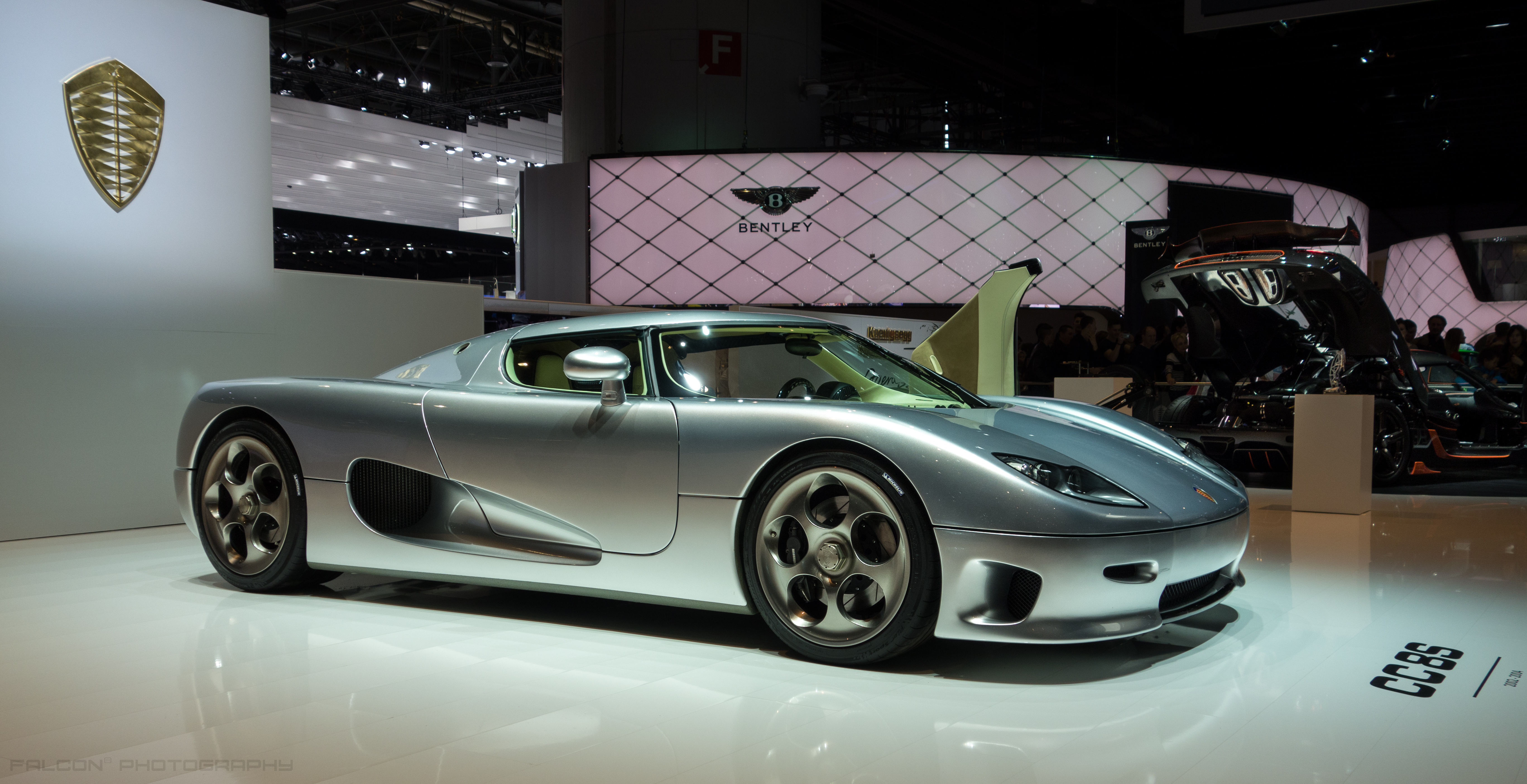 2002 6 exemplaires V8 4.7 Ford 655ch 750N.m 1100kg 390 km/h 0-100 en 3,2sec Boite méca 6 rapports. 370 000€ en 2004